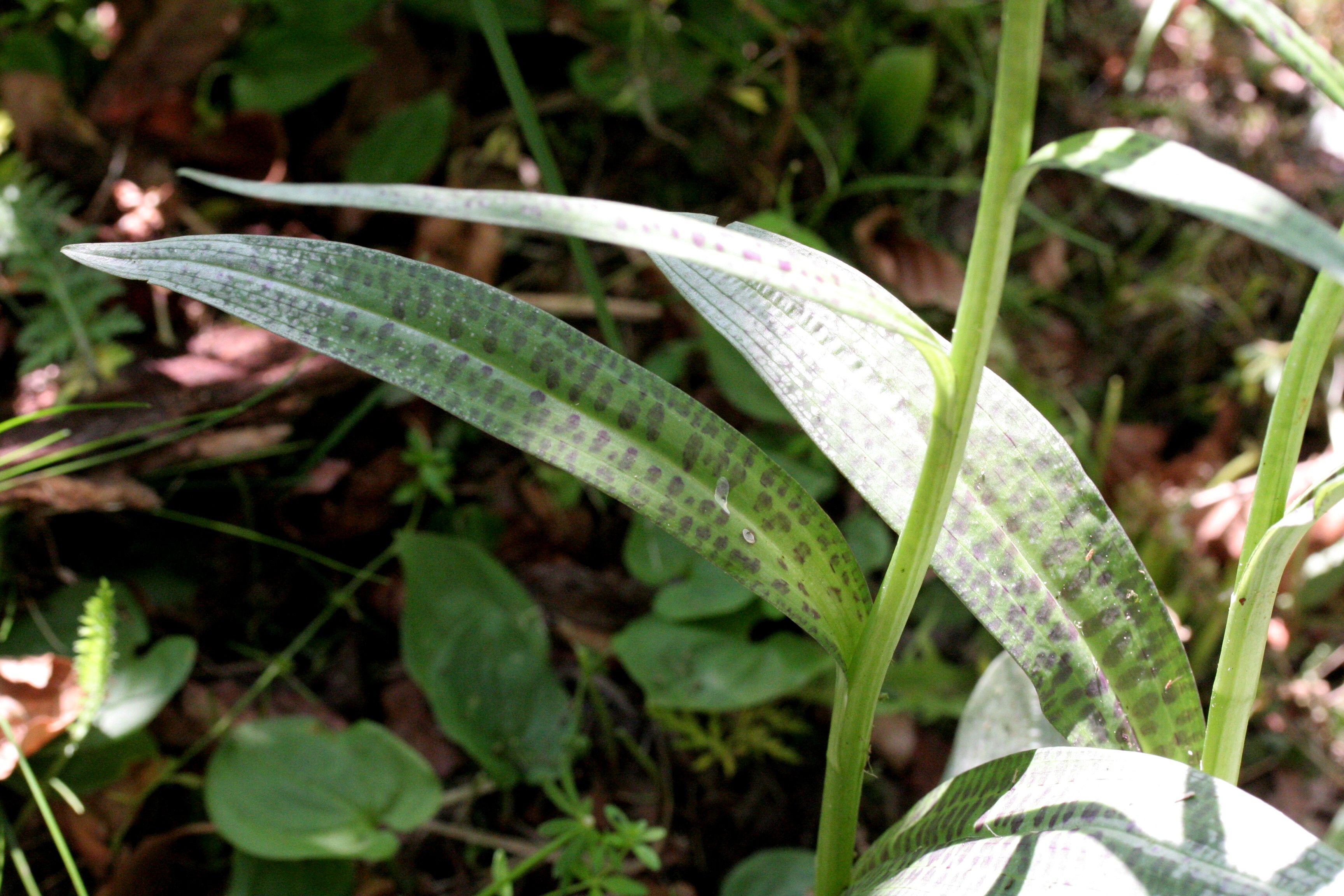 Orchis di Fuchs - Località: Giardino Botanico Alpino "Giangio Lorenzoni", Pian Cansiglio, Tambre d'Alpago (BL), 1000 m s.l.m.